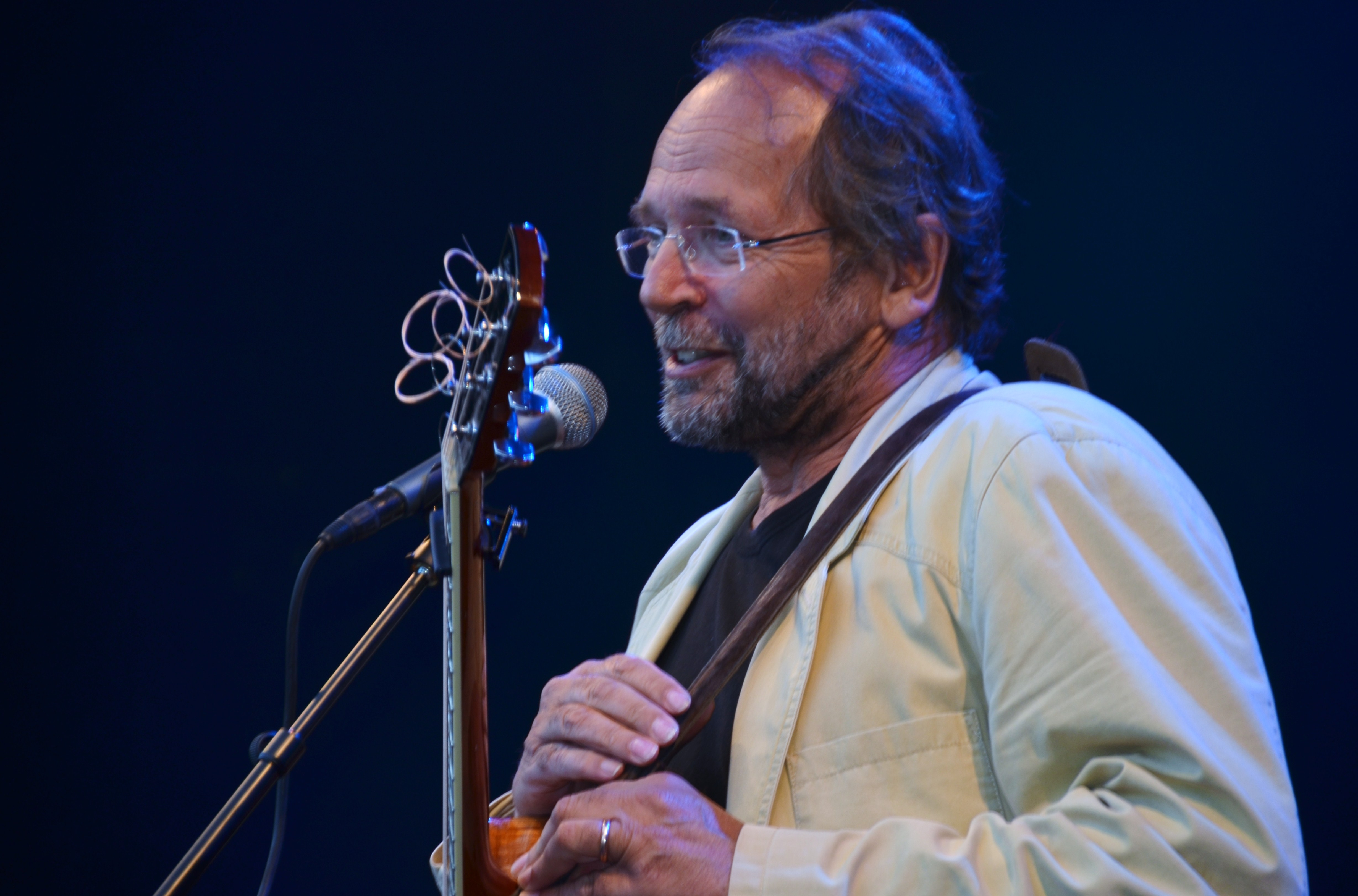 Ole Paus